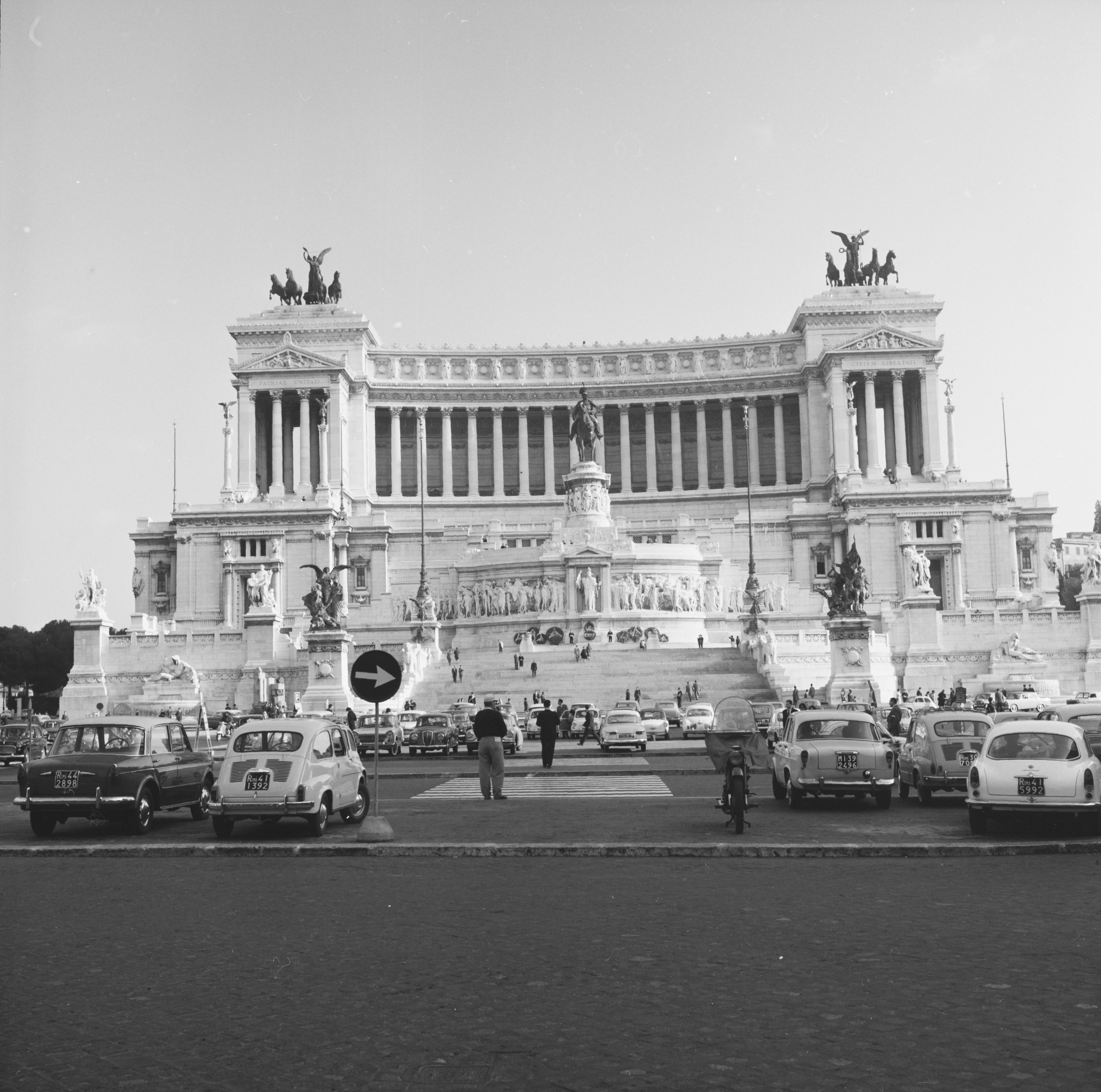 Bildet er hentet fra Nasjonalbibliotekets bildesamling. Anmerkninger til bildet var: Fotograf: E-KQ Roma